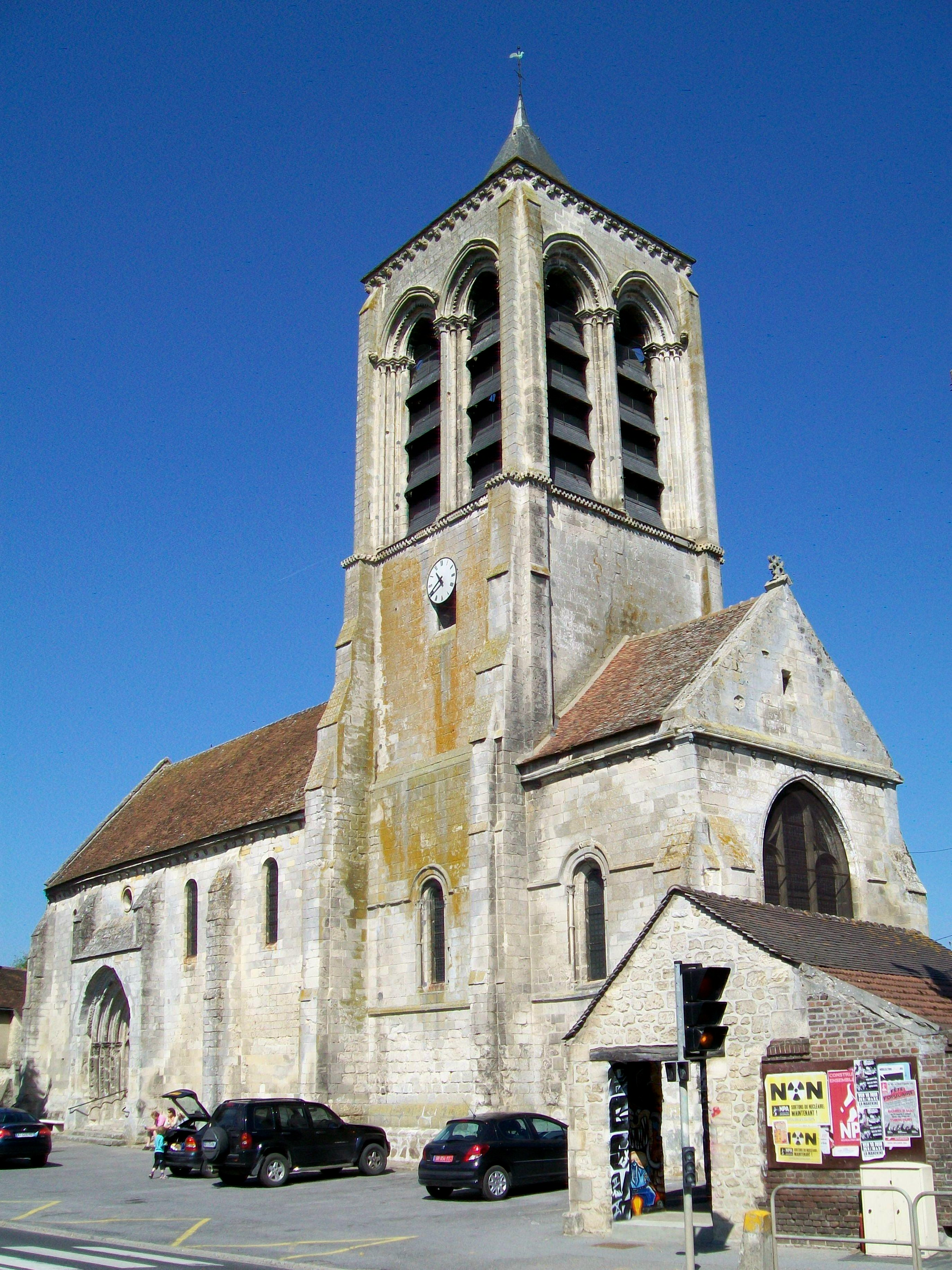 L'église Saint-Barthélémy des XIIIe et XVIe siècles, depuis le sud-est. Elle est classée Monument historique depuis 1921.